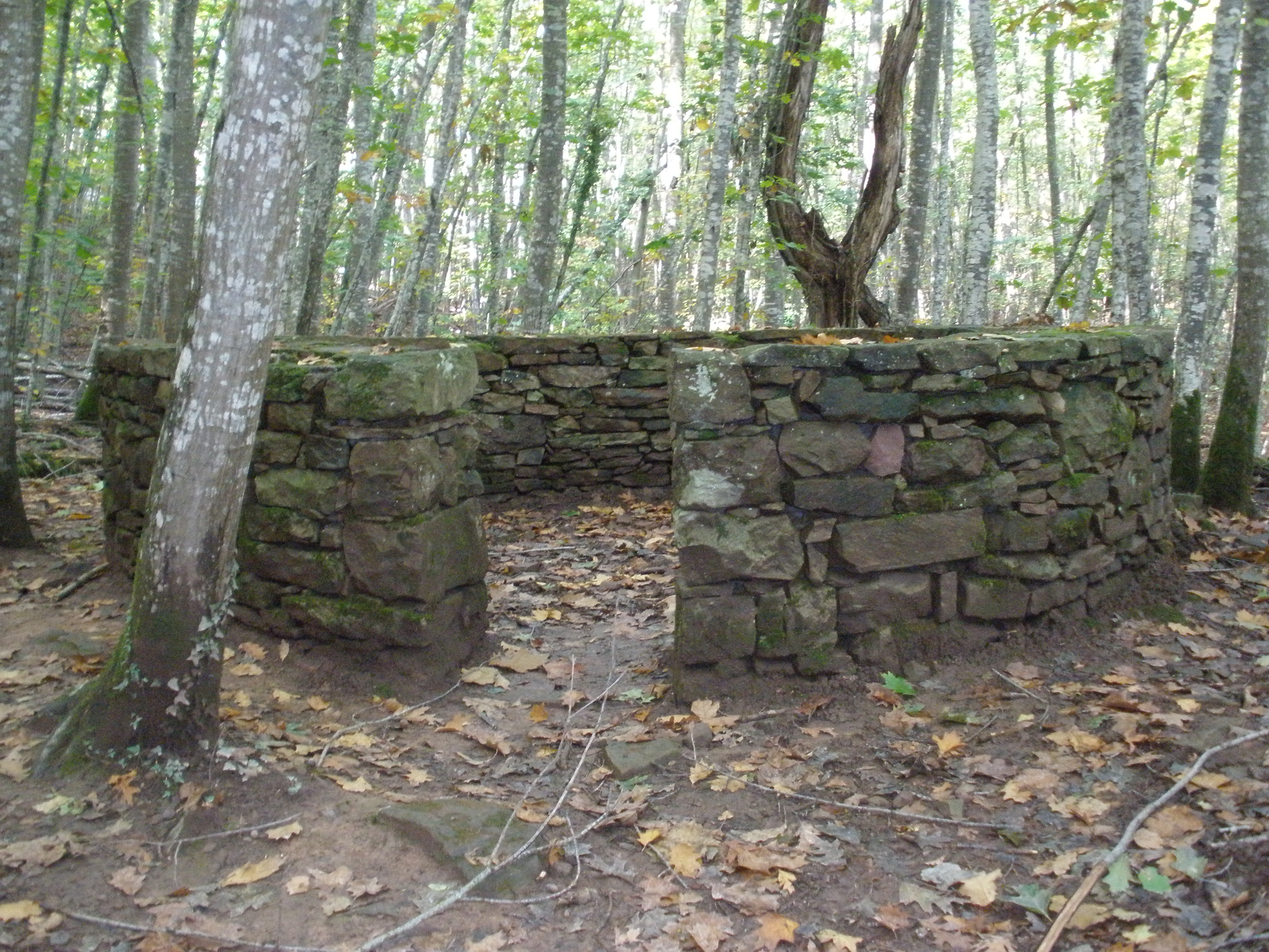 Gaztain hespila Bertizko Natur Parkean